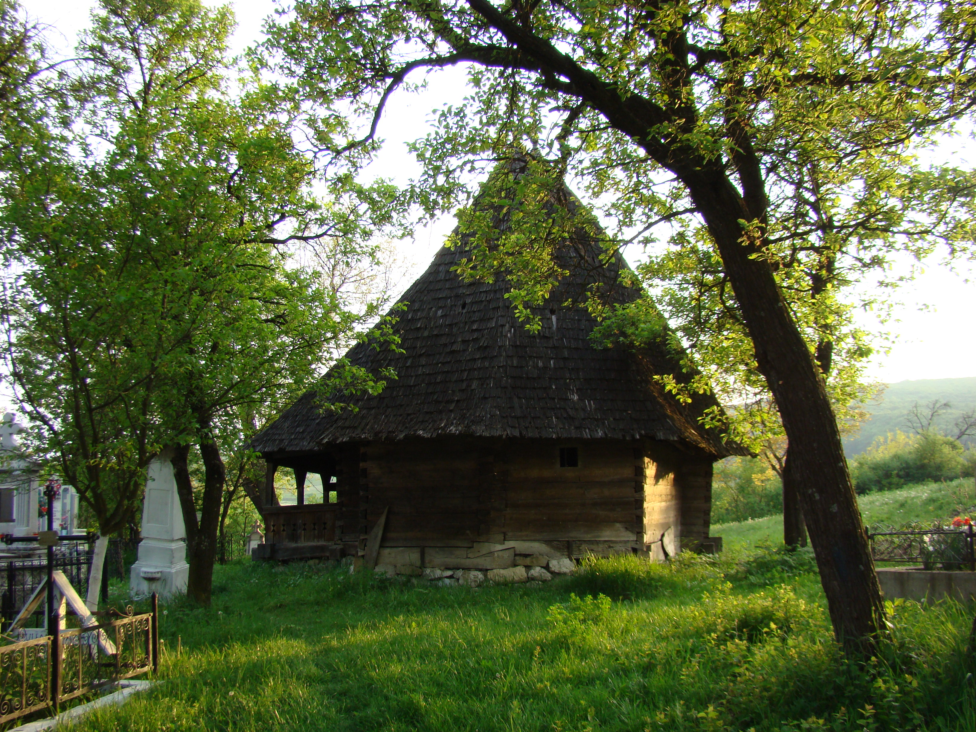 Biserica de lemn din Turdaș